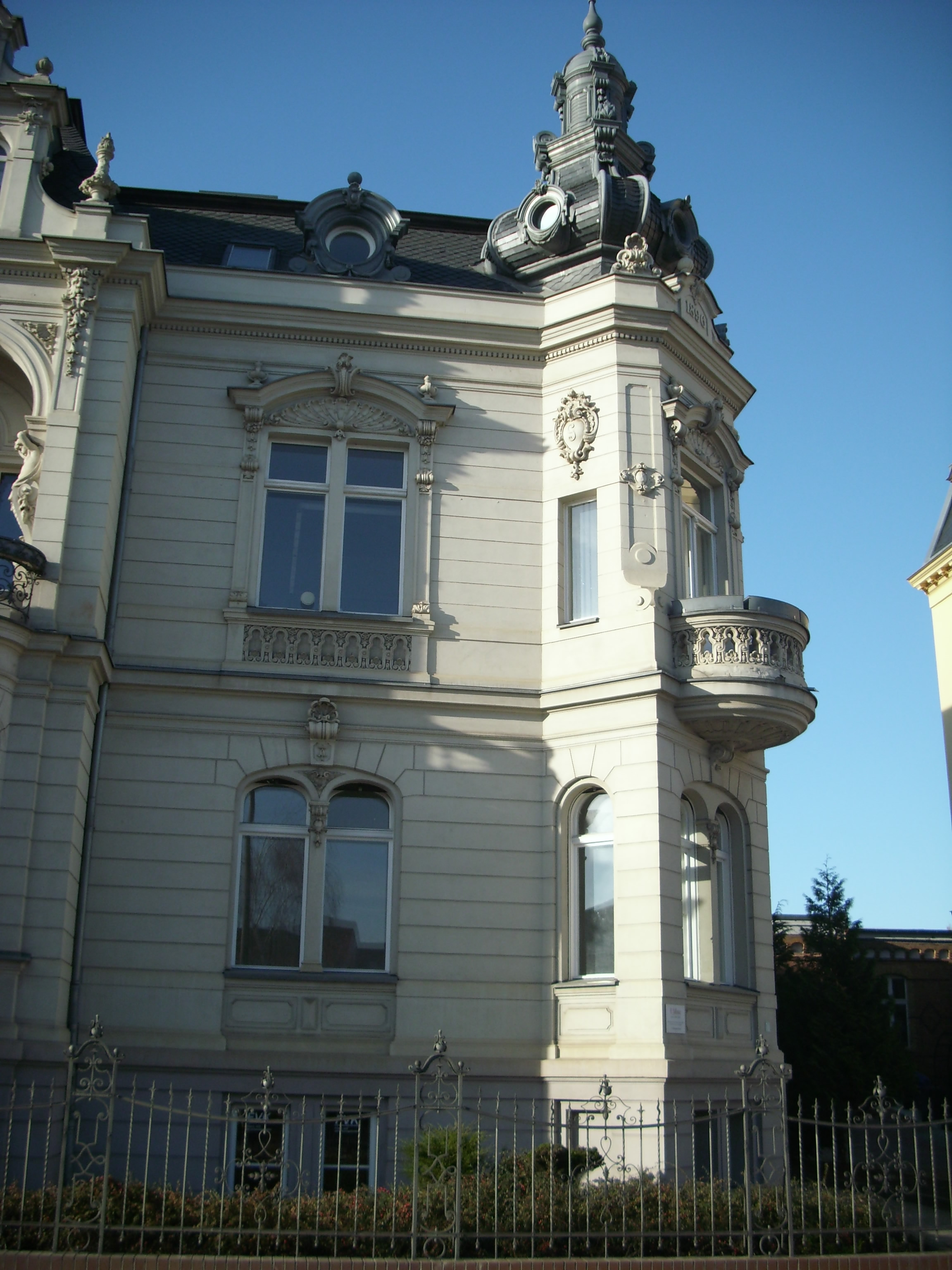 Bahnhofstraaae 76